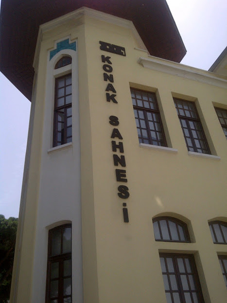 national theatre izmir